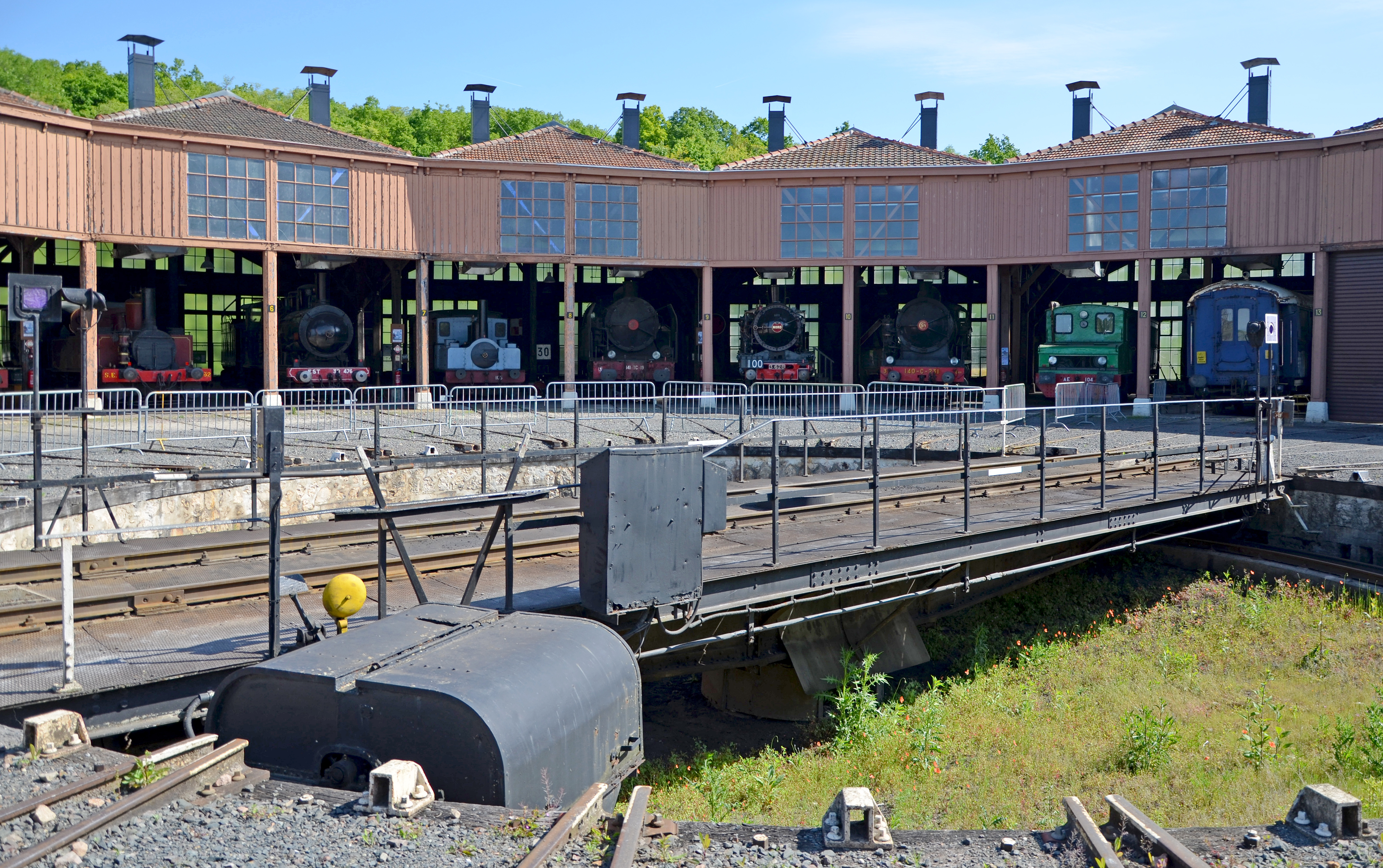 Rotonde SNCF de Longueville, Seine et Marne, France .